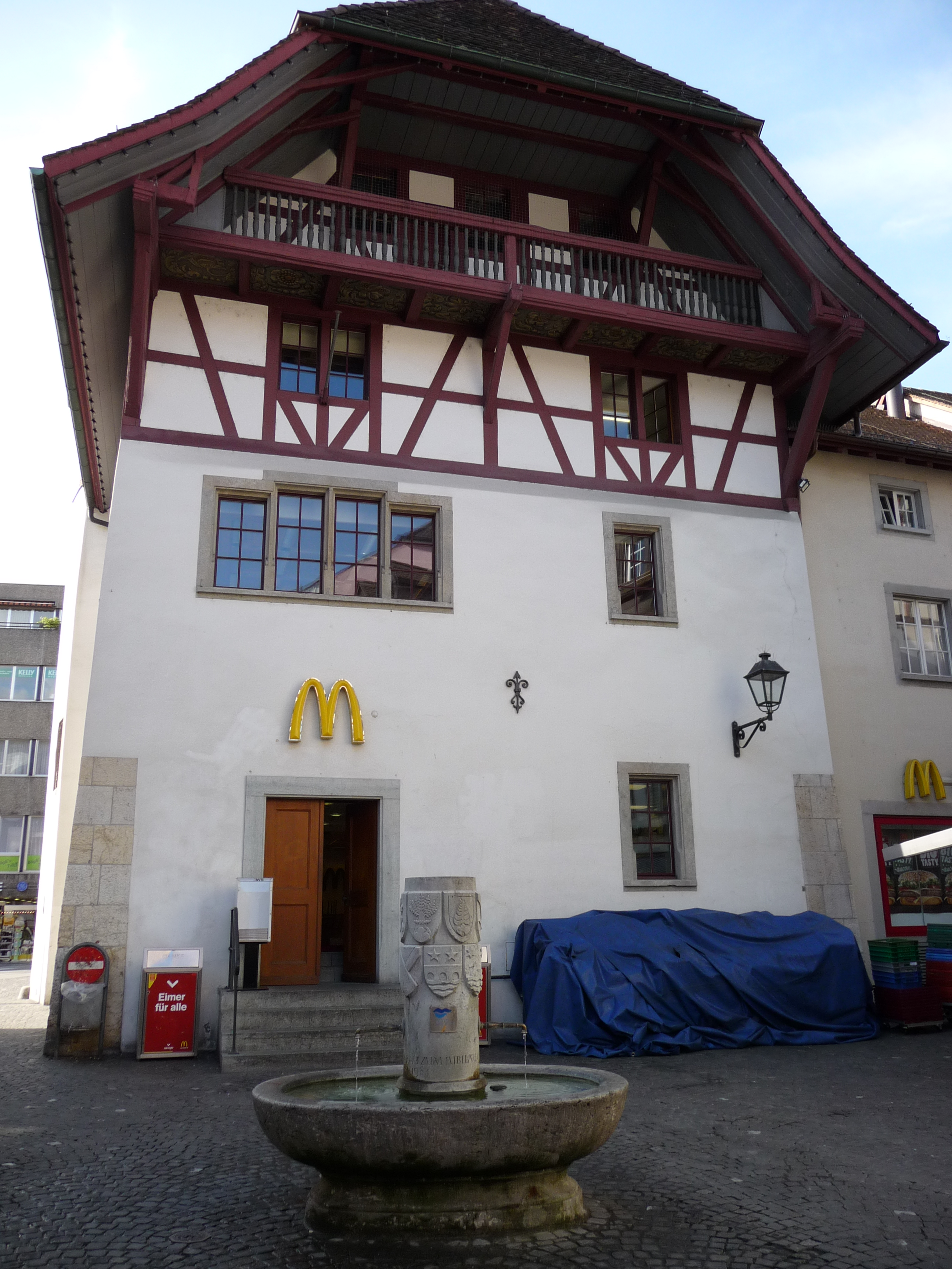 Obere Mühle mit Bezirksbrunnen im Vordergrund in Aarau